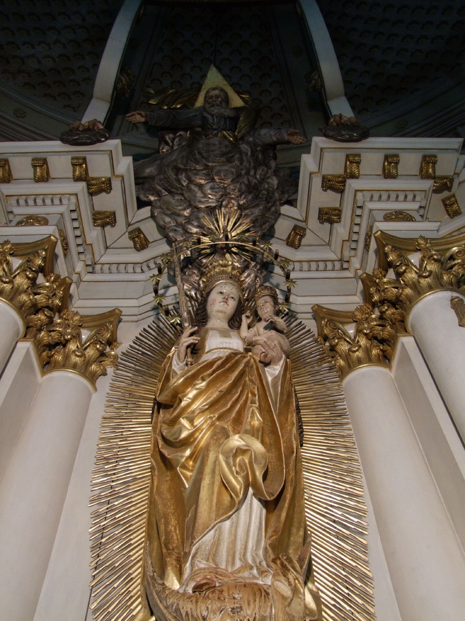 A csíksomlyói kegytemplom és kolostor kegyszobra.